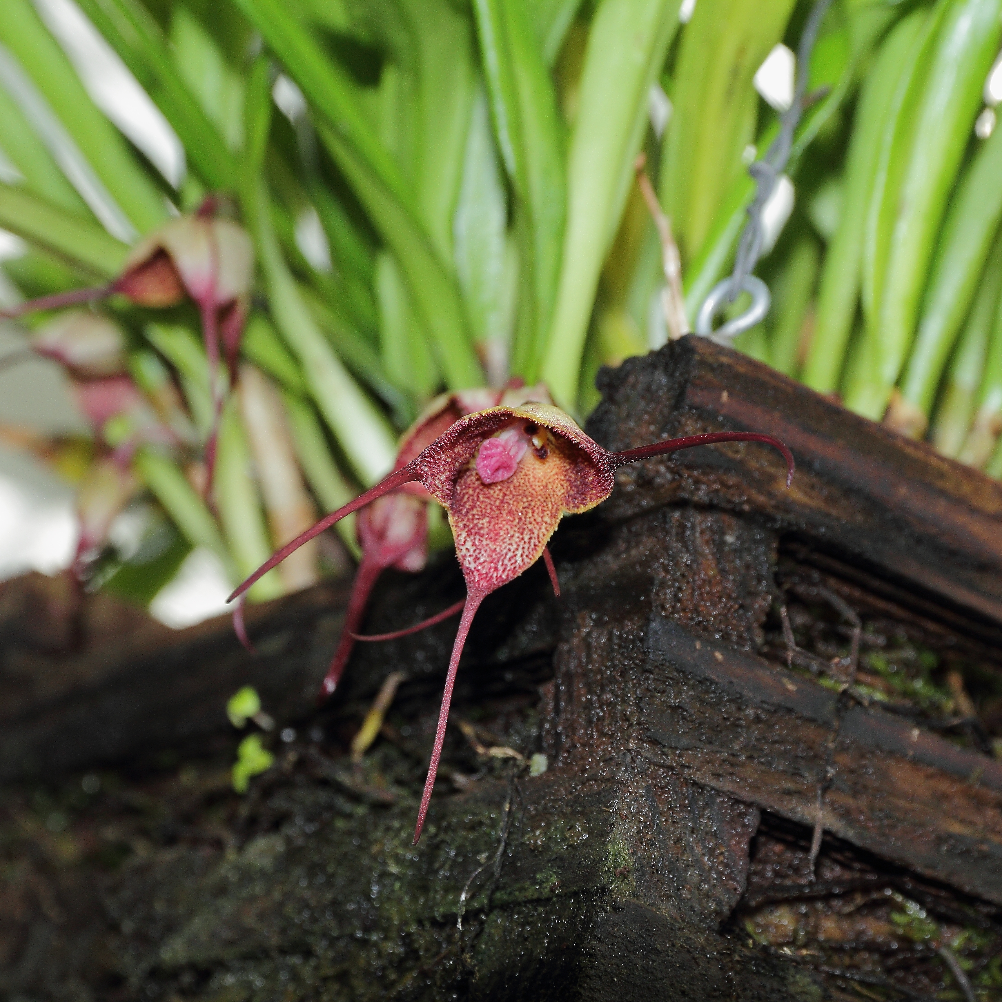 Dracula diabola i Göteborgs Botaniska Trädgård.